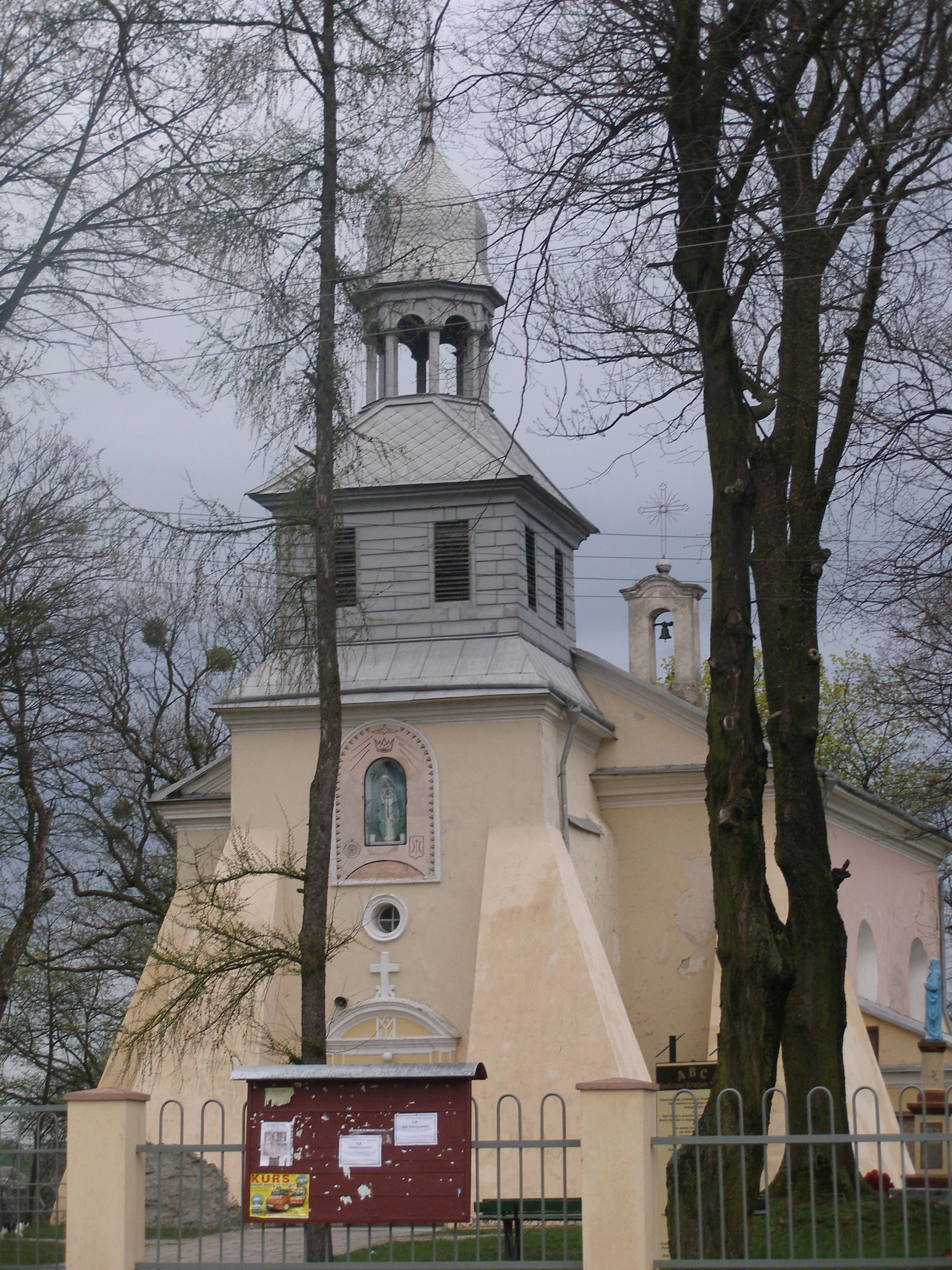 Kościół w Skierbieszowie WNMP